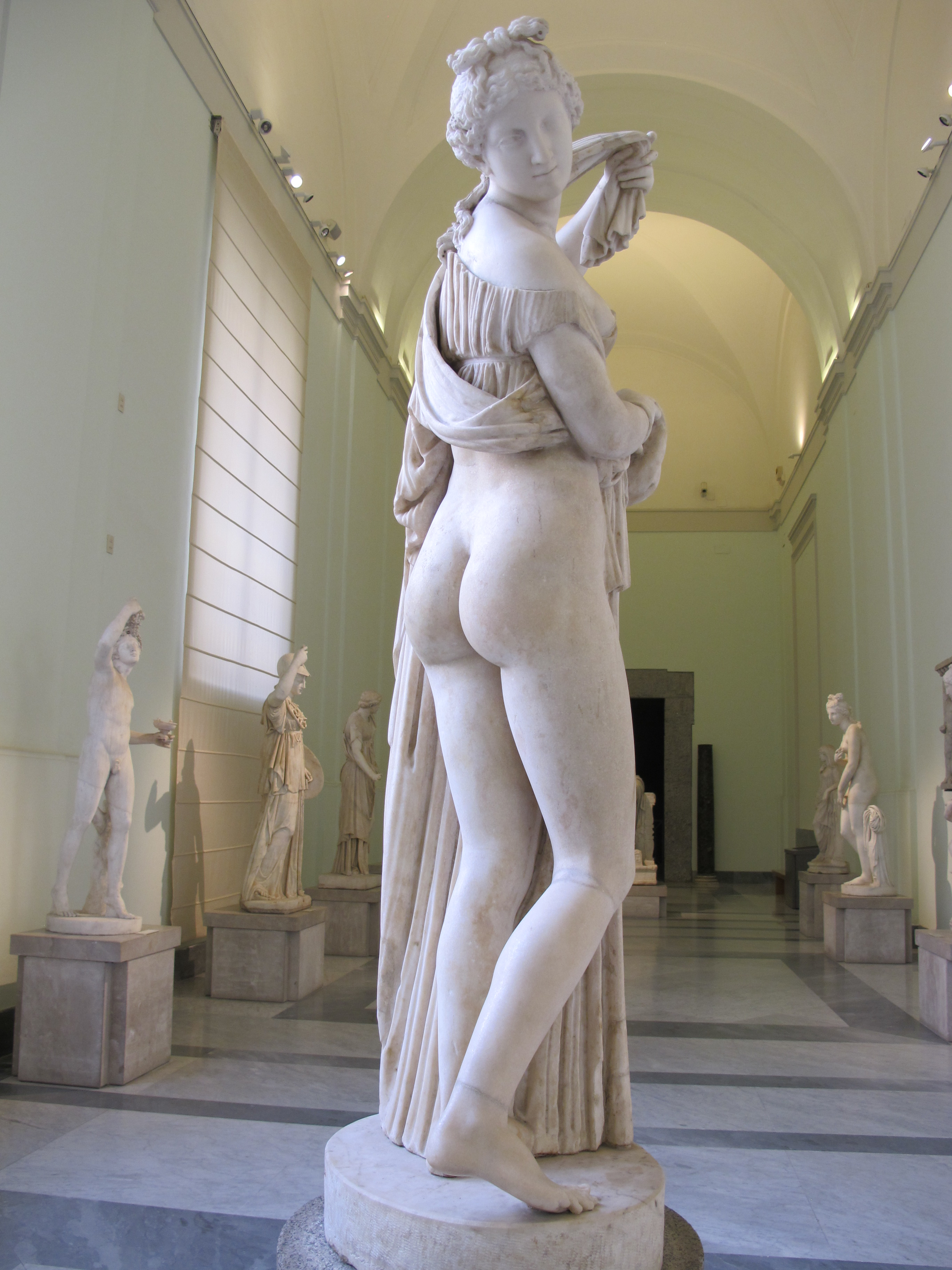 Venere Callipige. Museo archeologico nazionale di Napoli. Collezione Farnese.